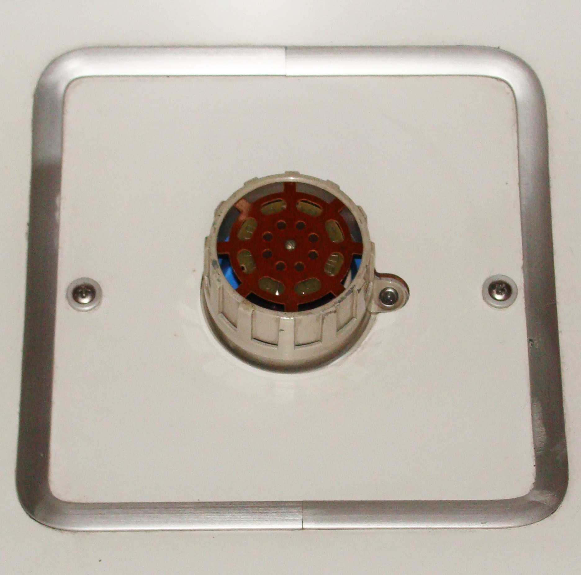 Пожарный дымовой извещатель в поезде